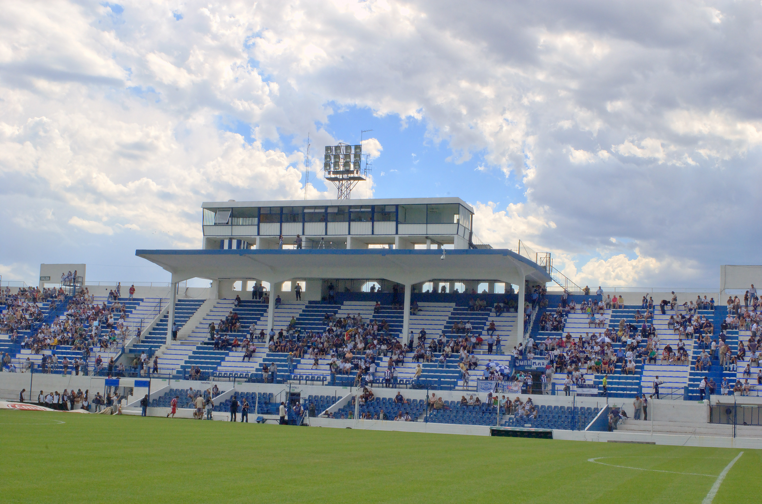 Estadio "La Boutique". Estadio del Club Atlético Talleres de Córdoba, Argentina.